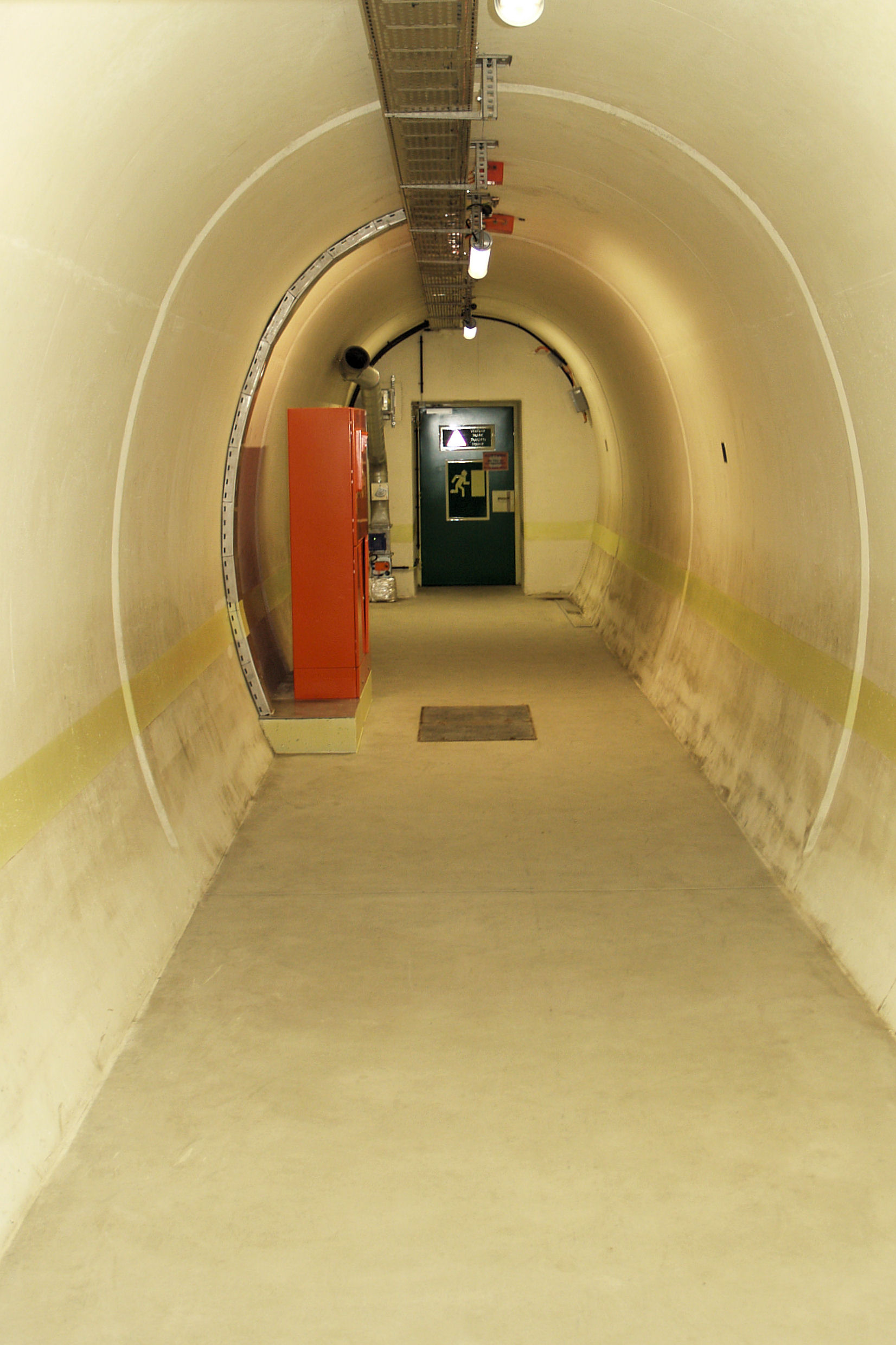 Innenansicht eines Rettungsstollens (Verbindungstollen zwischen den beiden Tunnelröhren)